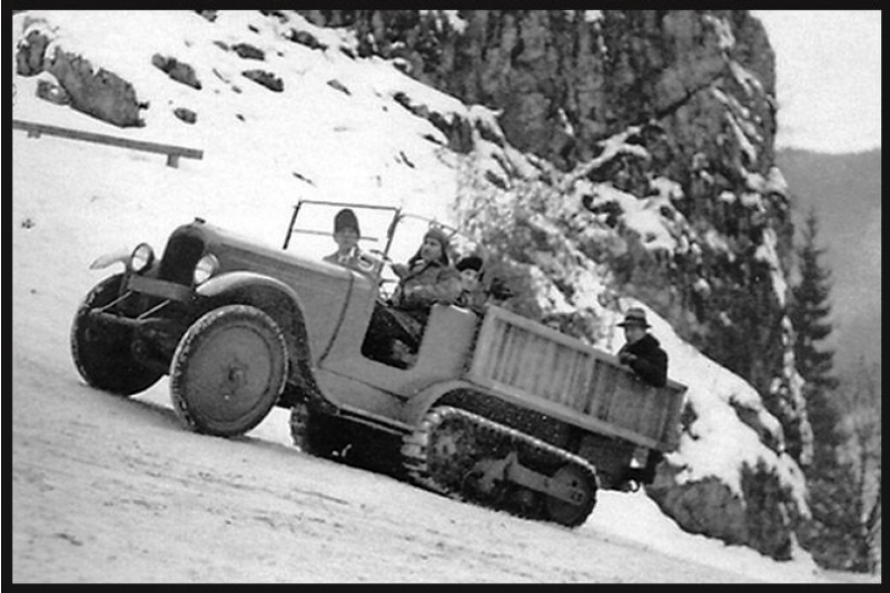 Autoşenilă pe Drumul Vechi